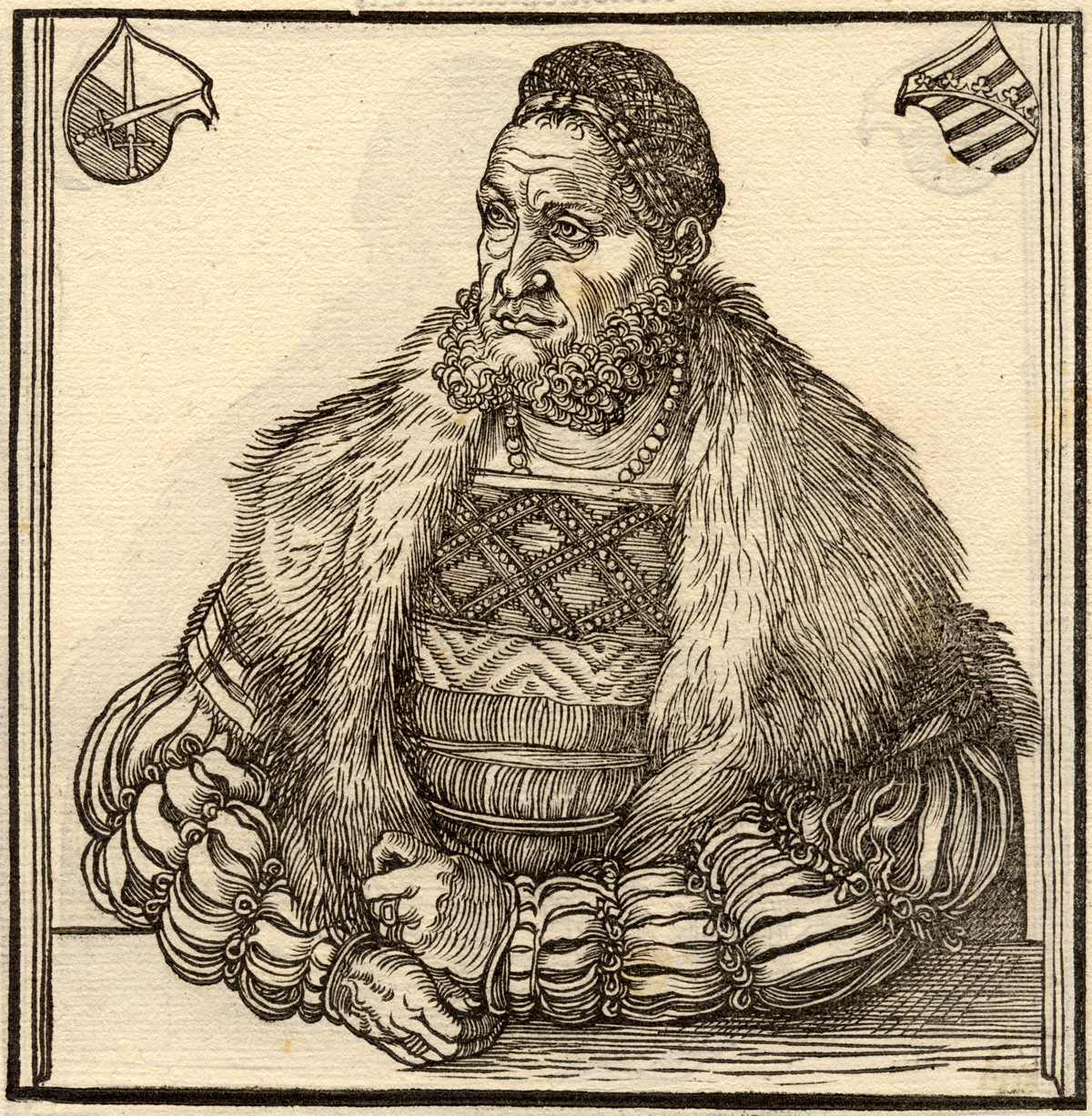 Friedrich der Weise von Sachsen, Holzschnitt von Lucas Cranach d.Ä. von 1510 aus der Sammlung Hofbauer